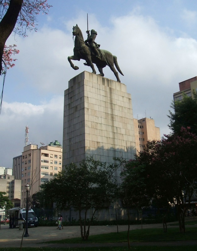 Monumento ao Duque de Caxias, de Victor Brecheret. Praça Princesa Isabel, centro de São Paulo.